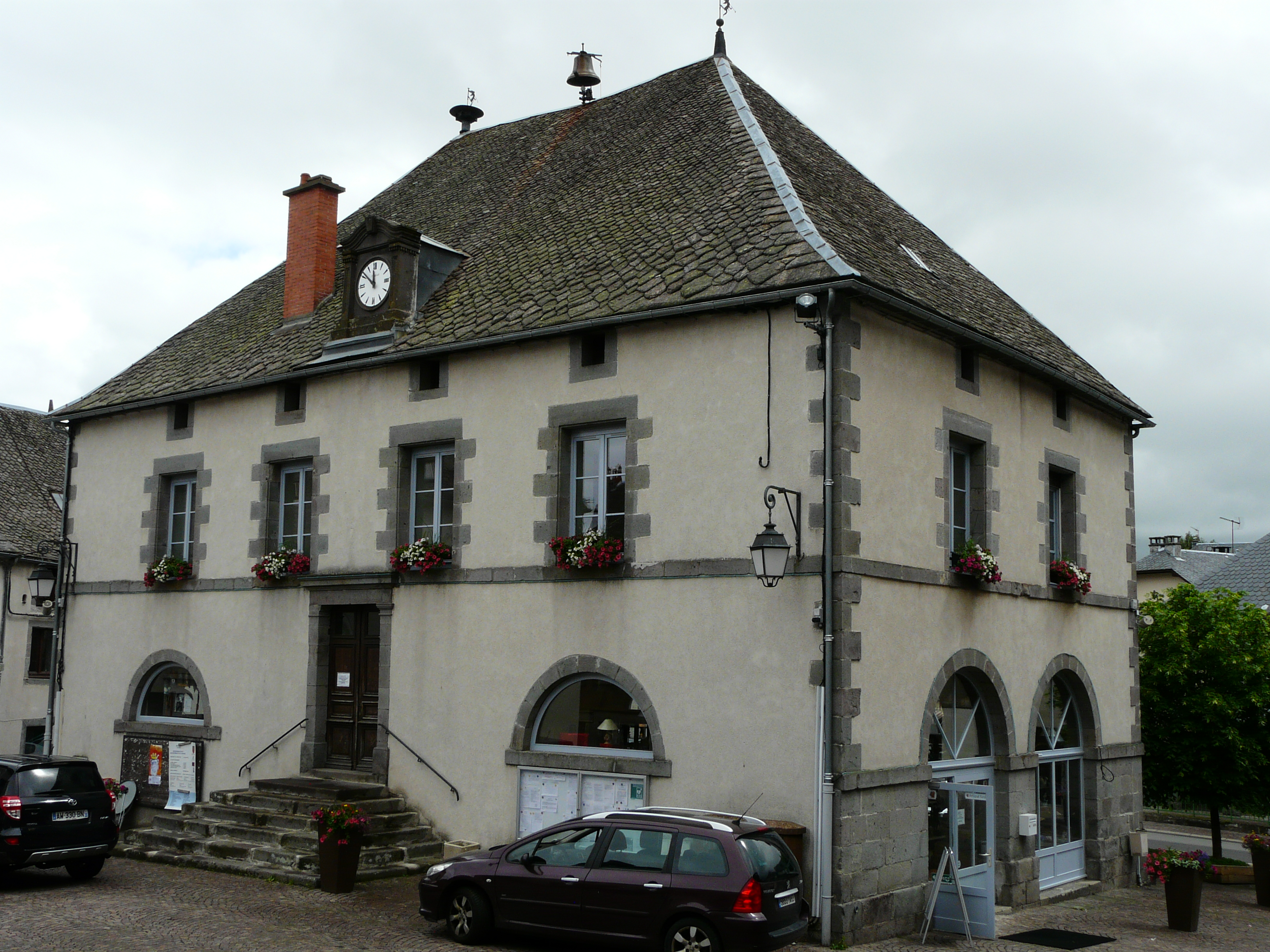 Le bâtiment de la mairie, Tauves, Puy-de-Dôme, France.